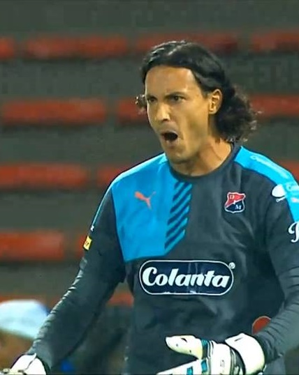 David Gonzalez